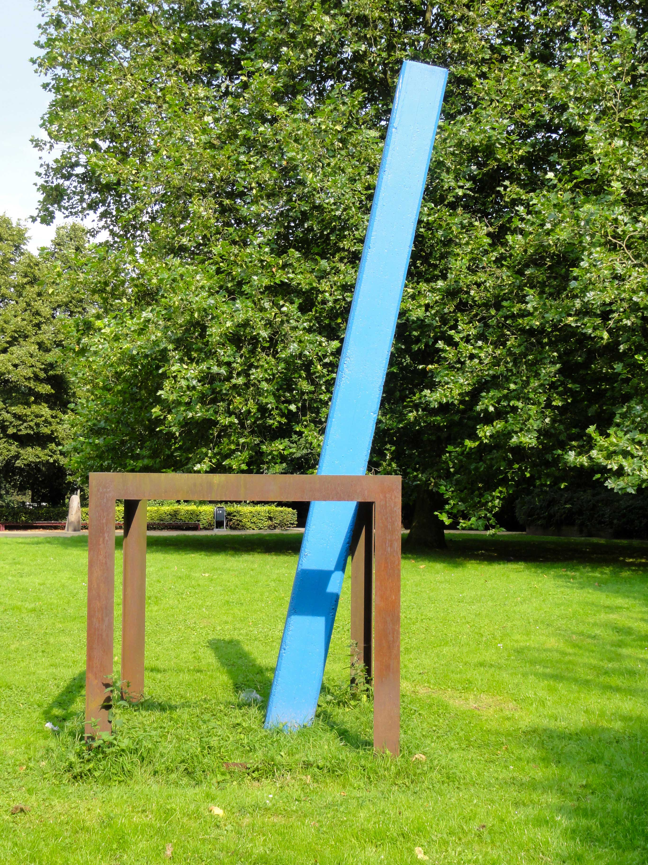 Dwazen denken te beschermen, door Berend Peter, in Javaplantsoen, Amsterdam